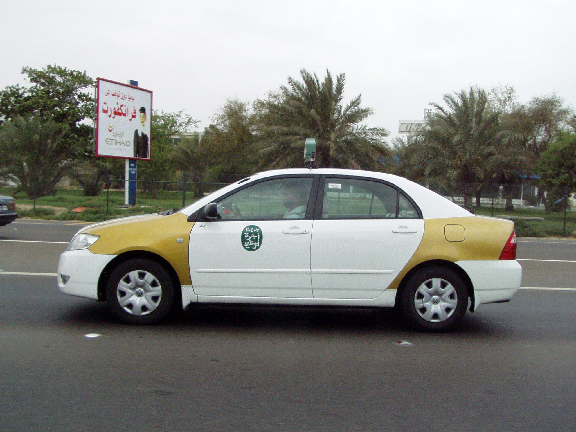 Taxi in Abu Dhabi / U.A.E.